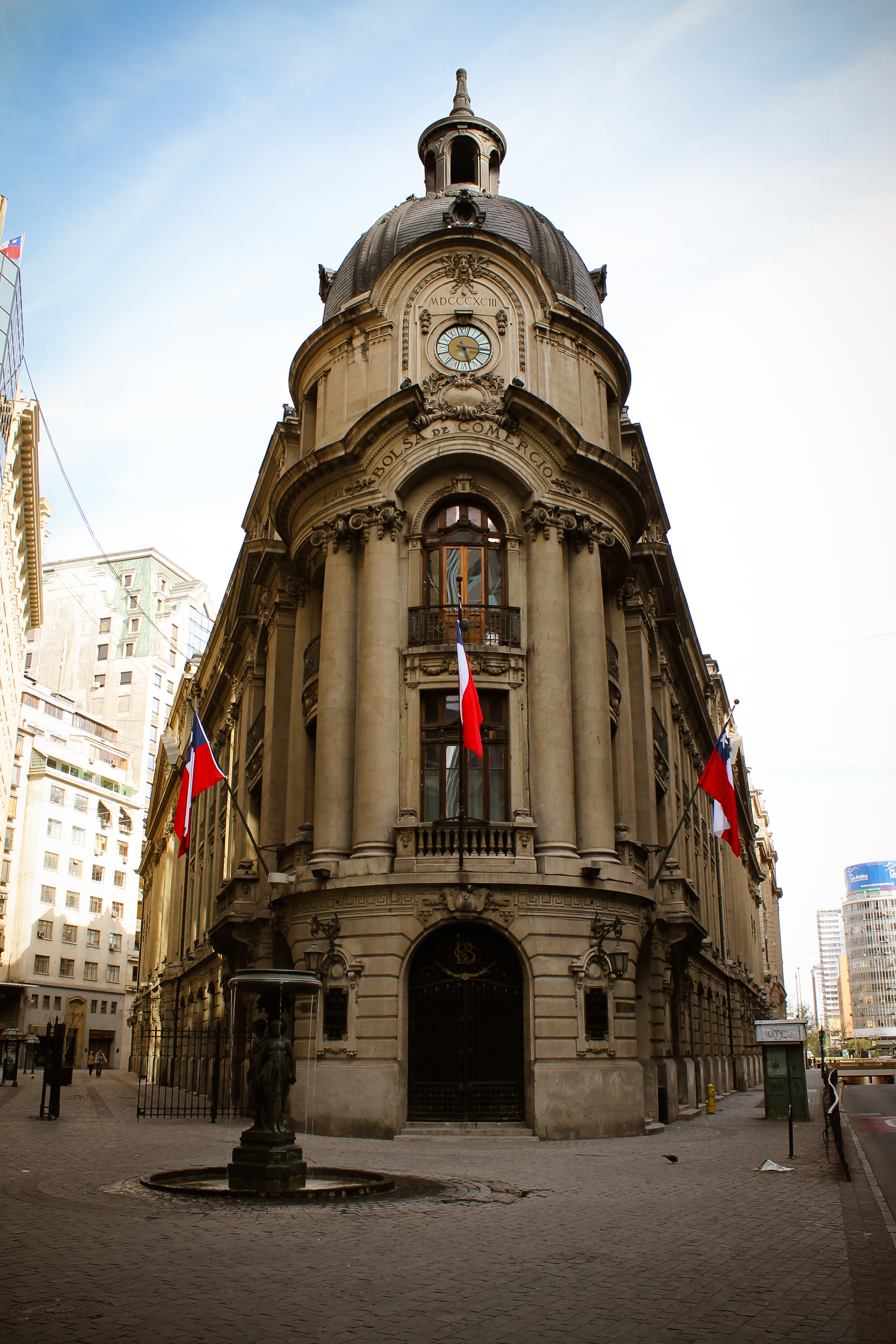 Entrada principal de la Bolsa de Comercio. Santiago, Chile This is a photo of a national monument in Chile: 841